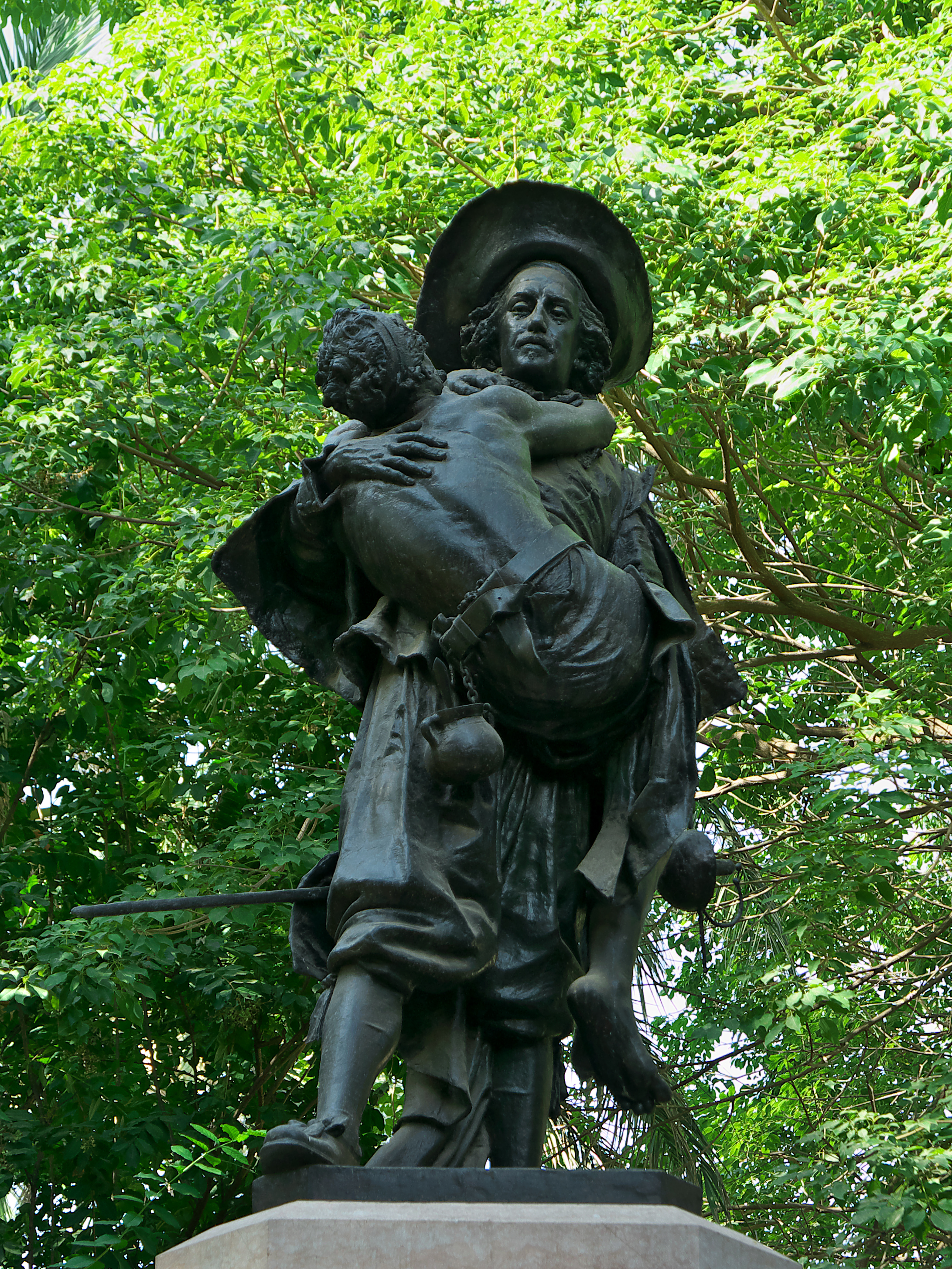 Jardín de la Caridad (Sevilla). Miguel de Mañara con un mendigo en brazos (1902), Antonio Susillo.